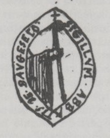 Sceau des abbés de Baugerais aux XIIe et XIIIe siècles. Le fichier est une photo de reproduction fidèle du sceau à l'époque, donc non soumis au droit d'auteur